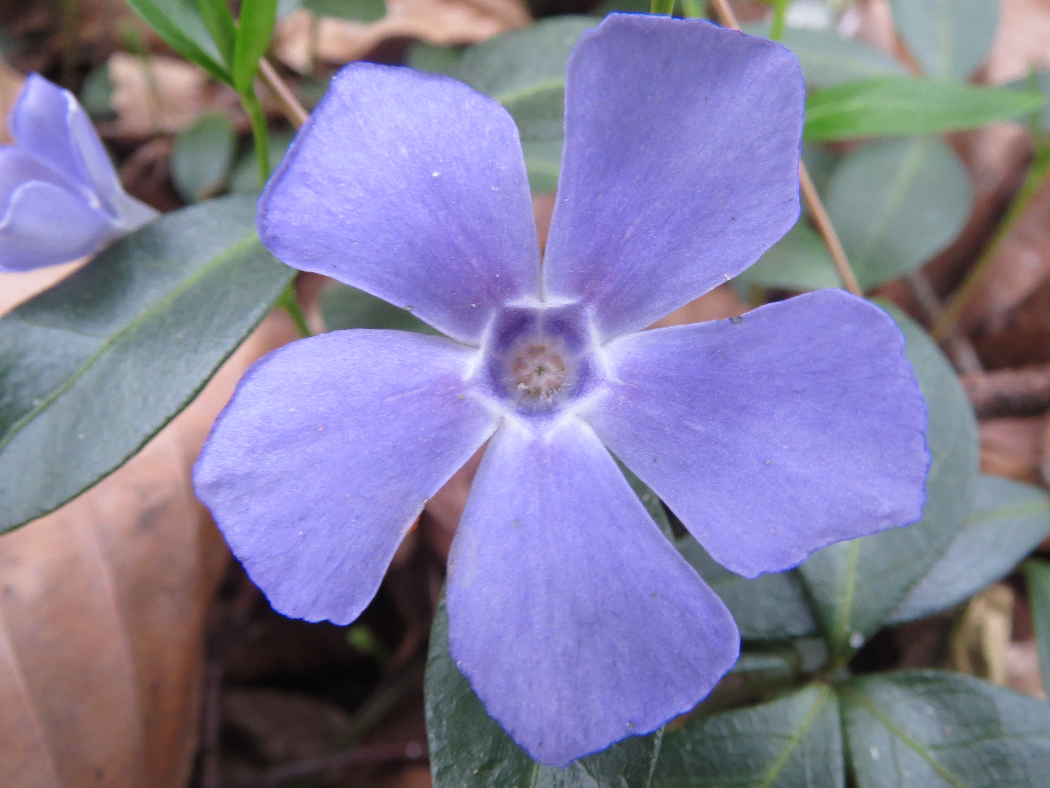 Kleines Immergrün (Vinca minor) im Schwetzinger Hardt